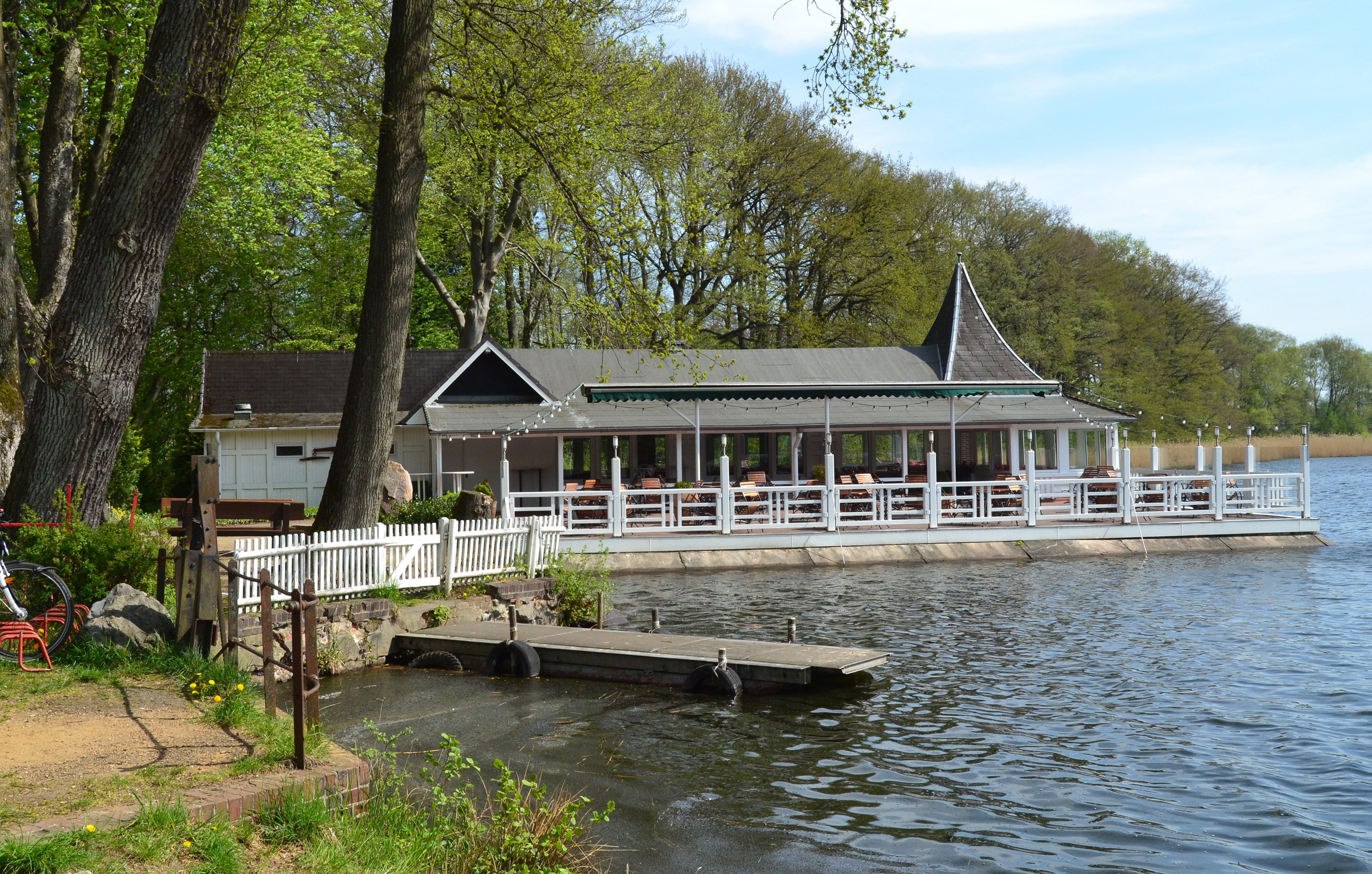 Der Seepavillon am Mühlenteich (Bokeler See)